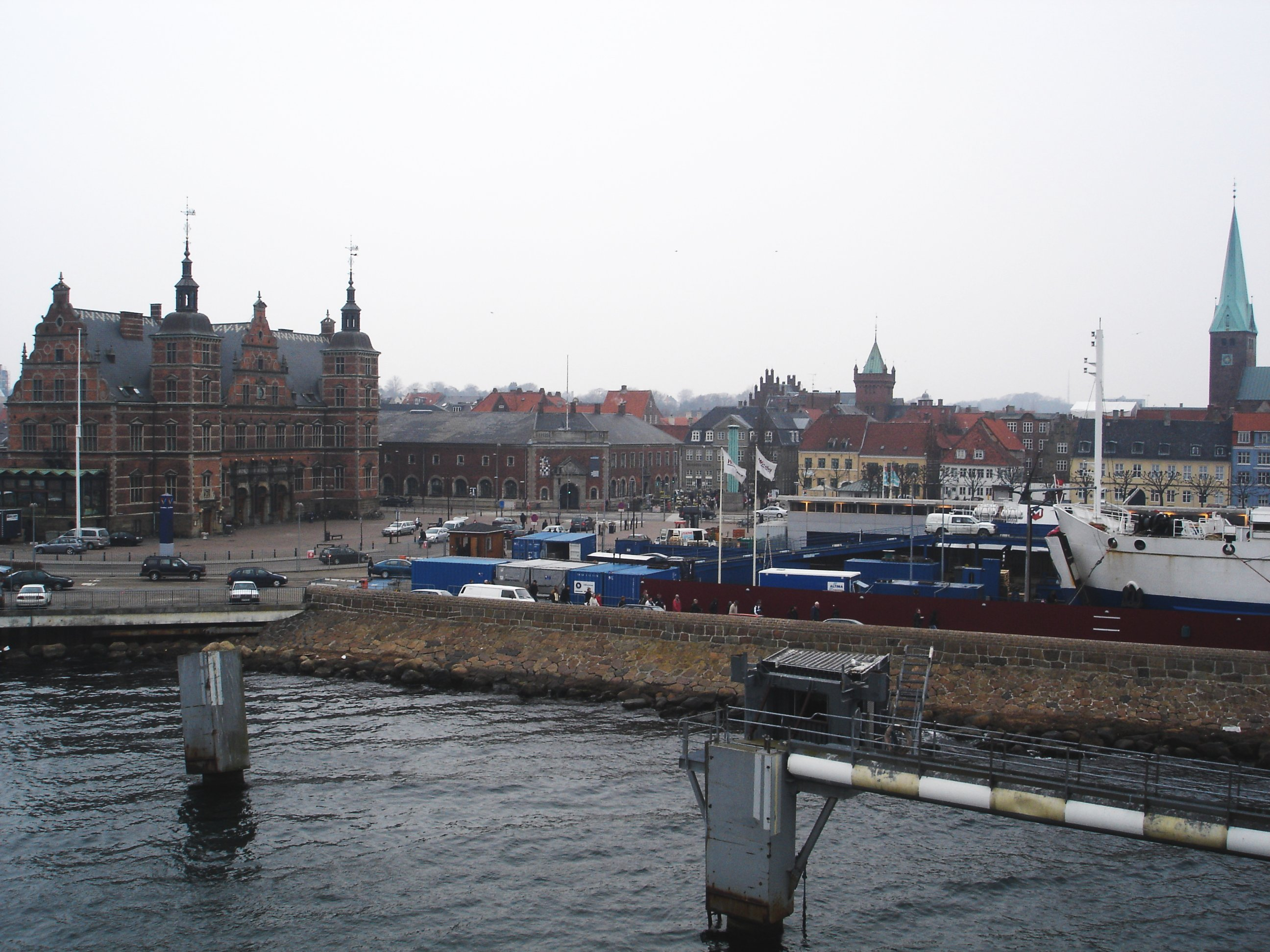 Helsingor, Denmark